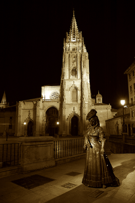 Vista nocturna de la estatua de La Regenta, personaje literario del escritor Alas Clarín, en la Plaza de la Catedral de Oviedo, que se ve al fondo.